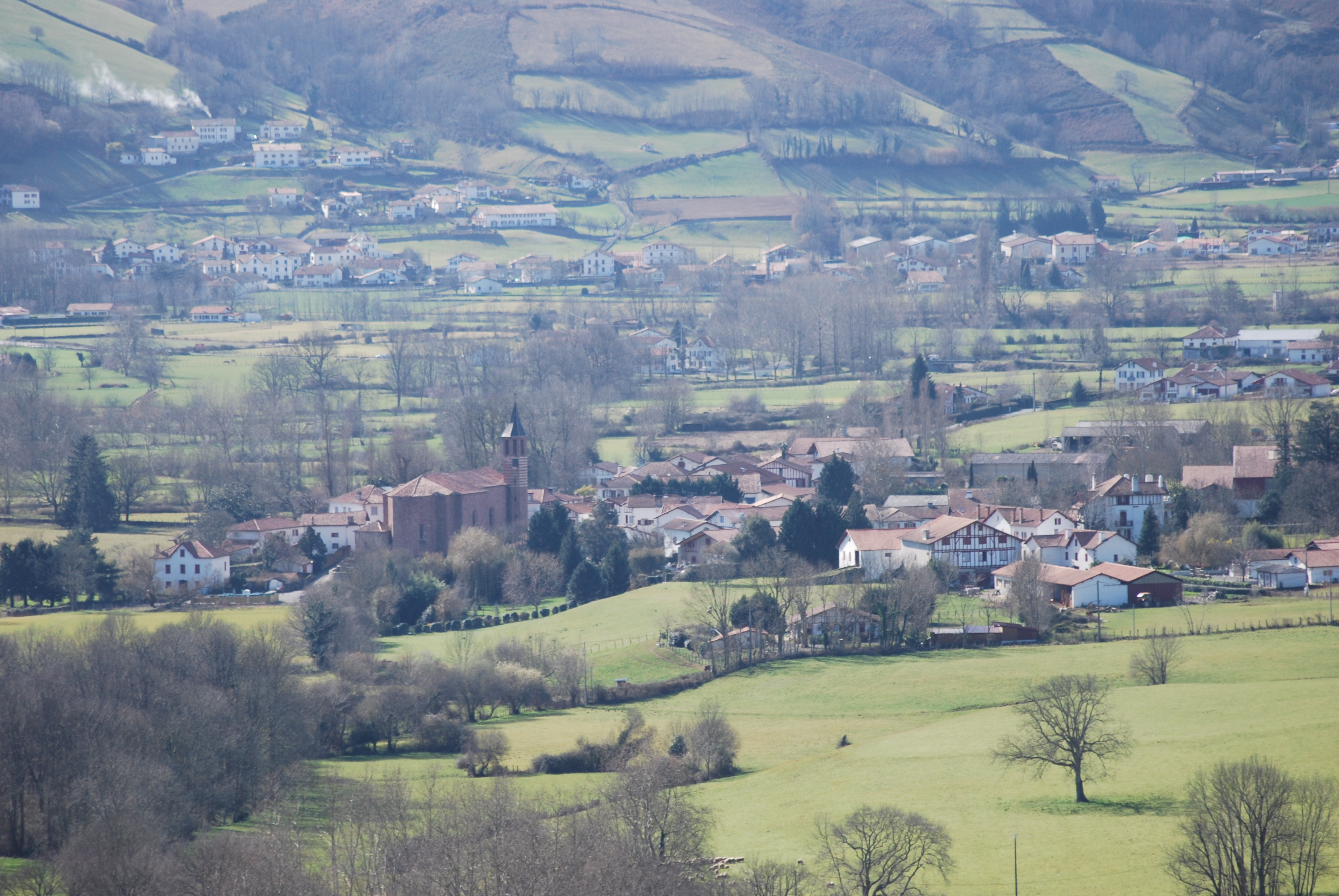 Vue générale d'Ossès